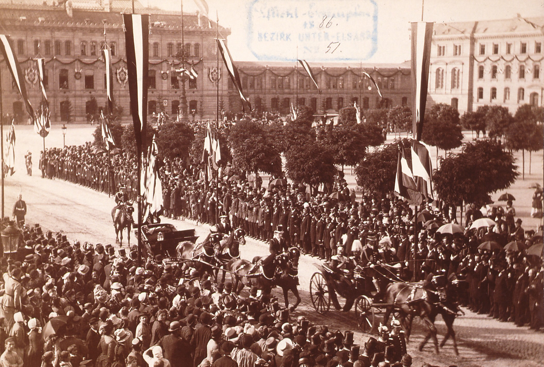 Arrivée de Guillaume 1er à Strasbourg en 1886.